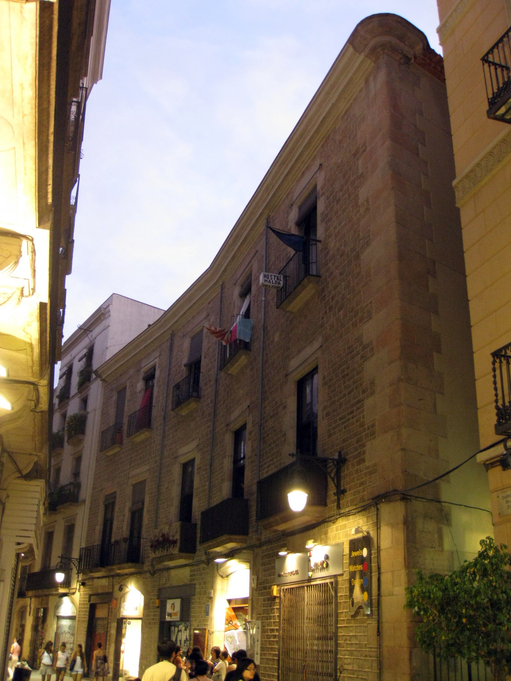 Palau Maldà, edifici del segle XVII, situat al carrer del Pi núm. 5, al barri Gòtic de Barcelona. Va ser residència incialment dels Cortada i, més endavant, dels barons de Maldà.